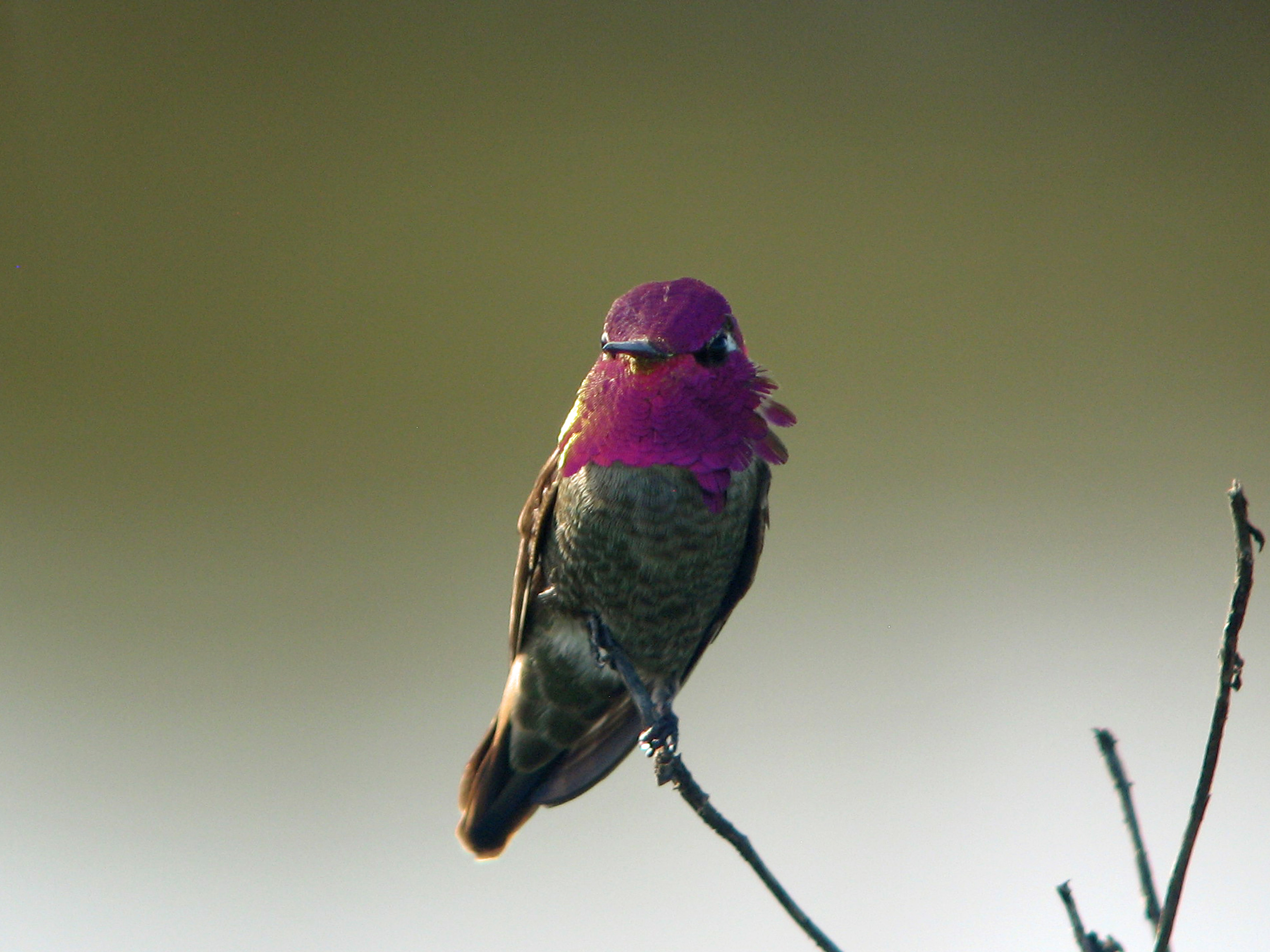 Anna's Hummingbird